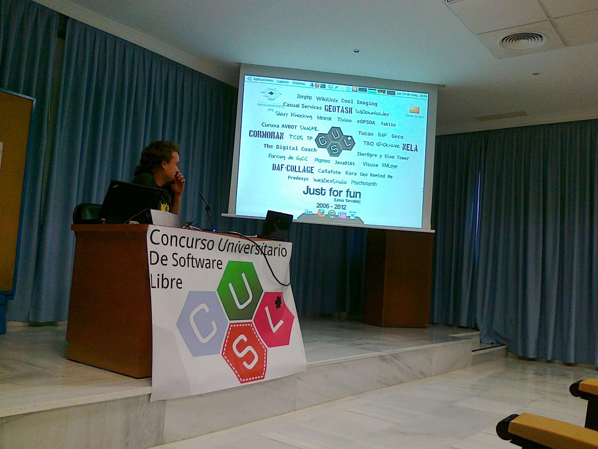 Ponencia de Pablo Neira en la Fase Final del VI Concurso Universitario de Software Libre. Escuela Técnica Superior de Ingeniería Informática de Sevilla (Andalucía, España)